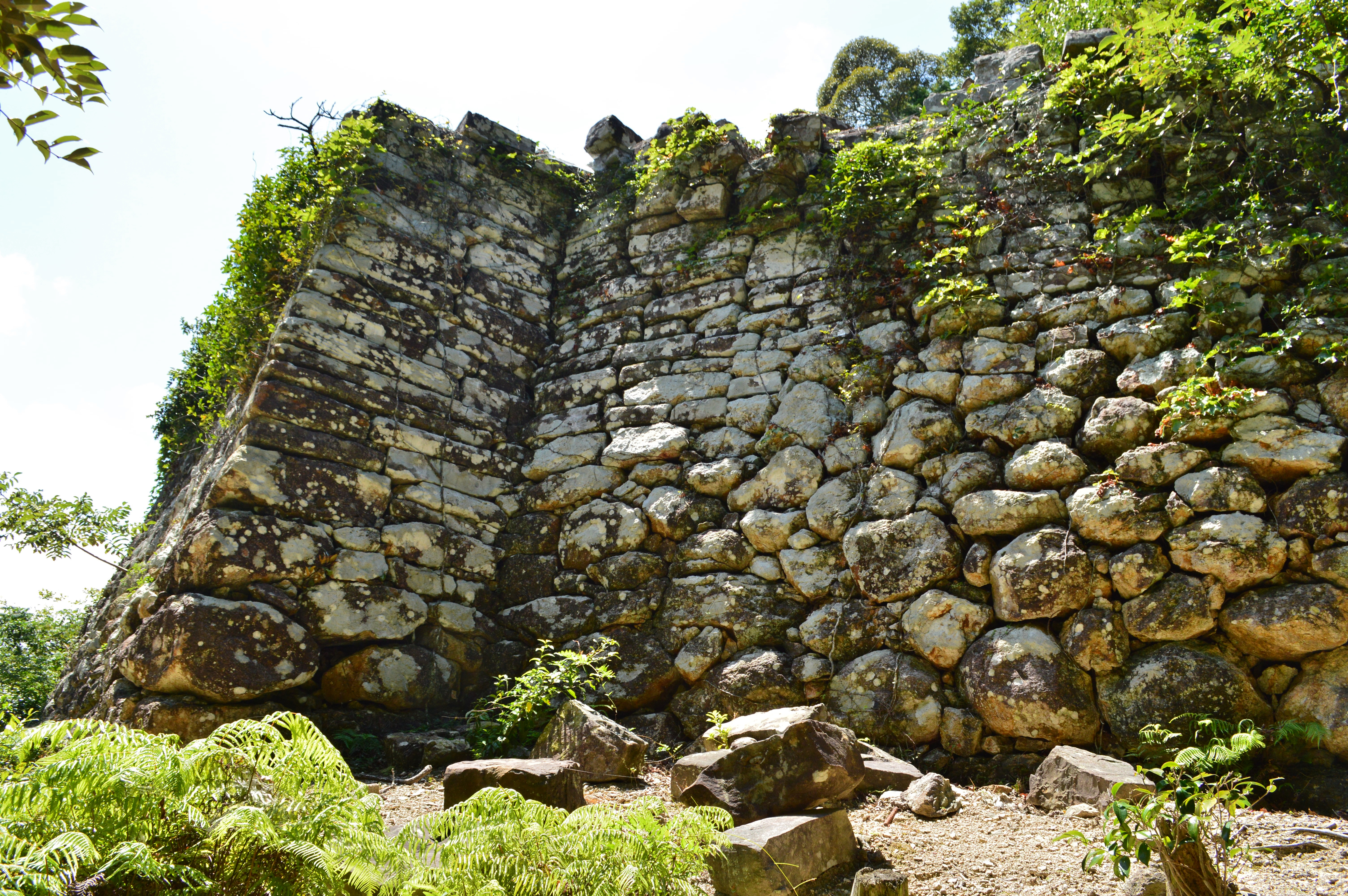 金田城 一ノ城戸付近張り出し